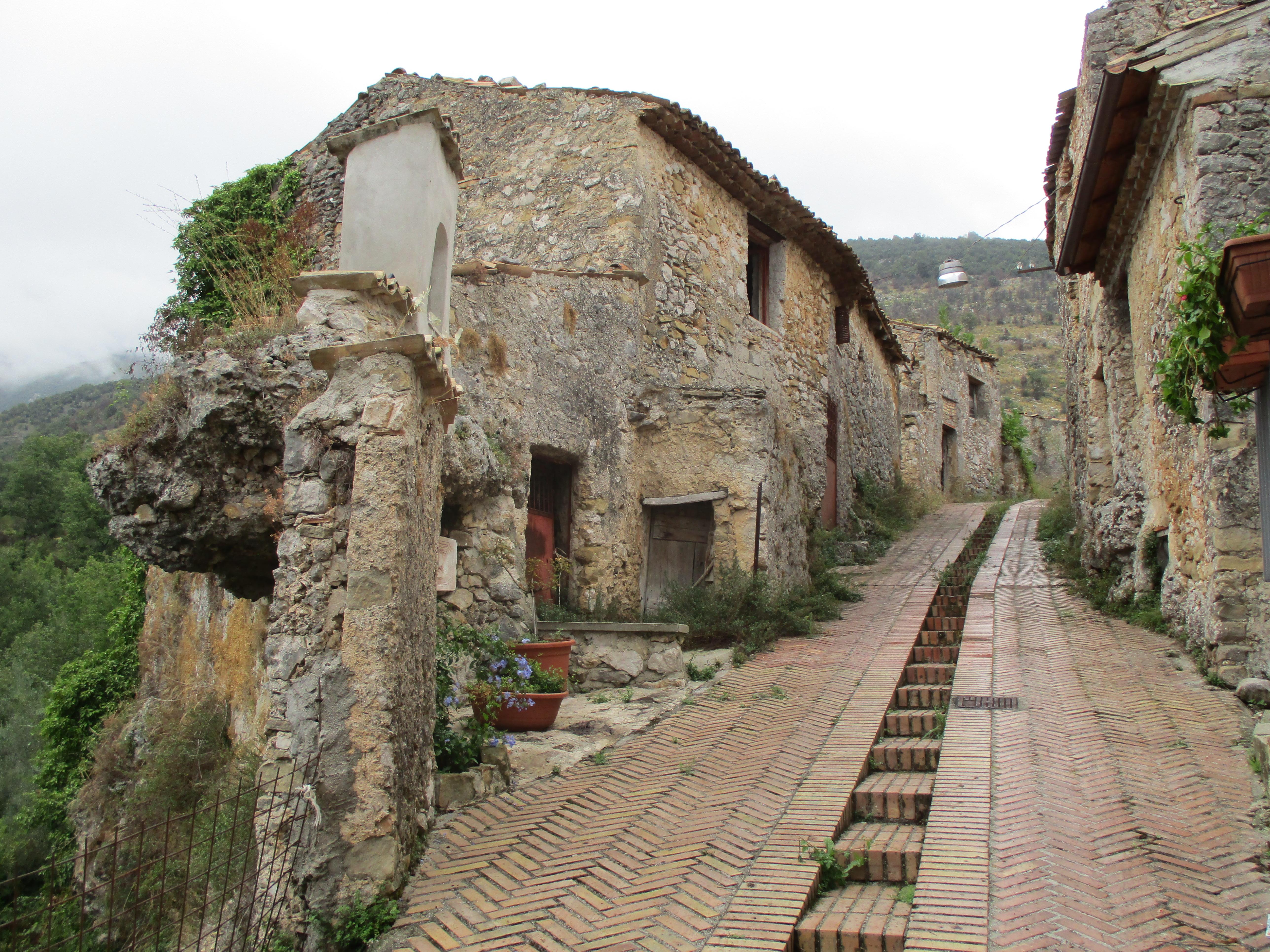 Scorcio del borgo superiore